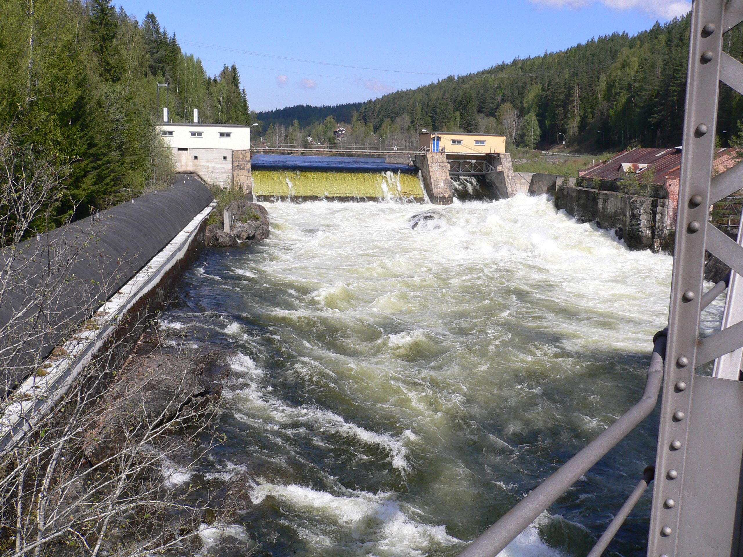 Hensfossen dam